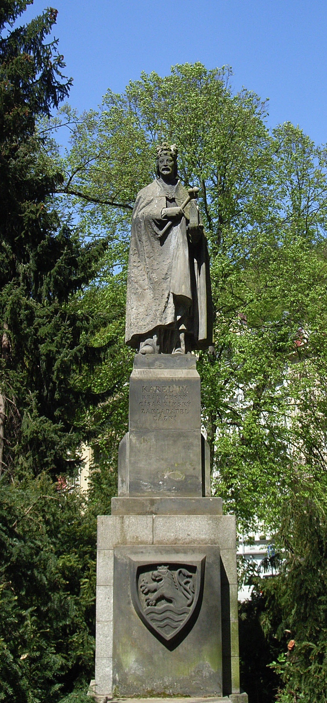 Pomník Karla IV. v parku u Lázní I v Karlových Varech, autor Otakar Švec.